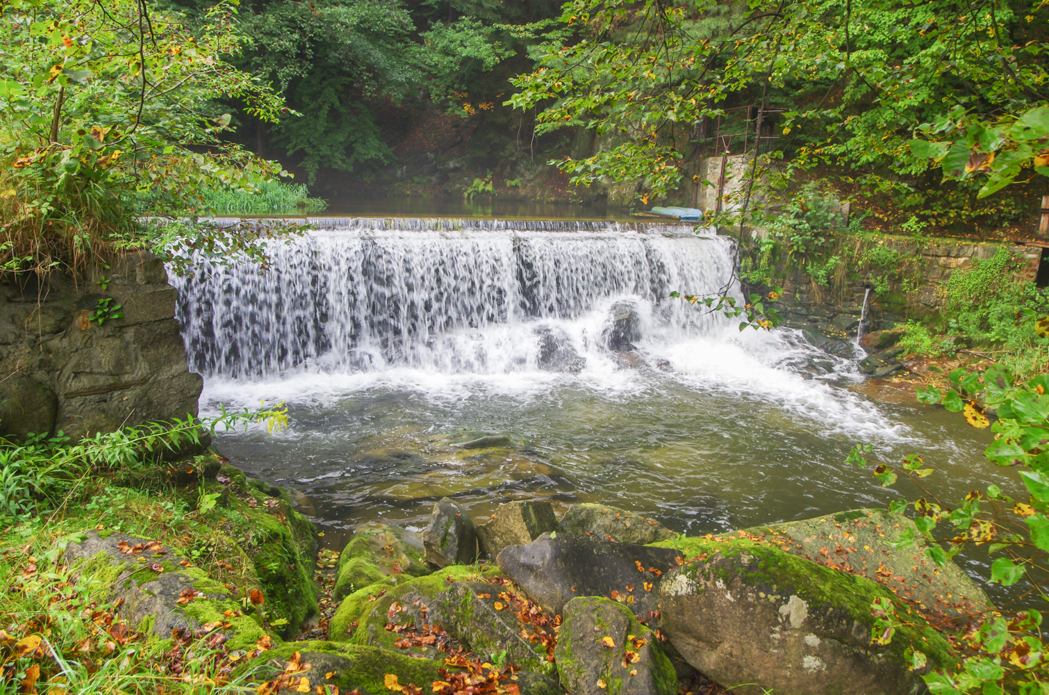 říčka Vidnavka u Tomíkovic, okres Jeseník